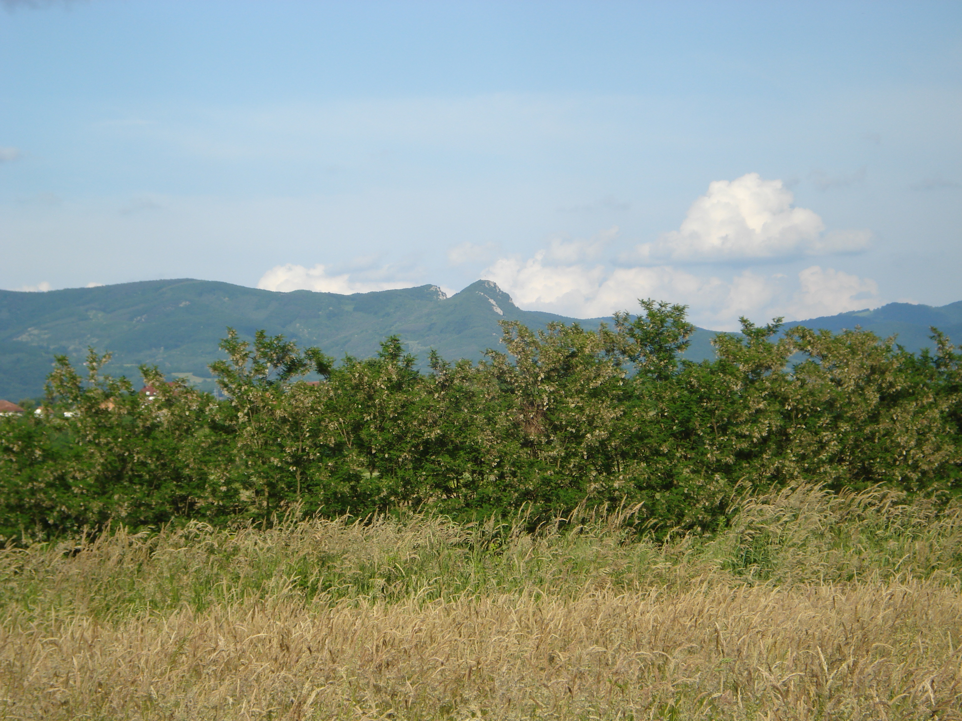 Kozara mountain, peak Kozaracki kamen